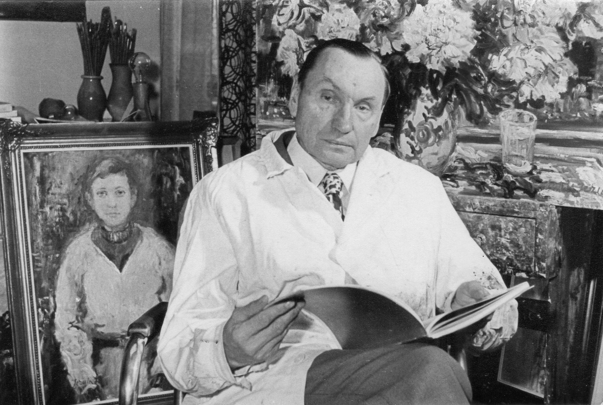 snímek zachycuje malíře Oldřicha Zezulu, jak jej vyfotografovala dcera Ing. arch. Šerá, rozená Zezulová